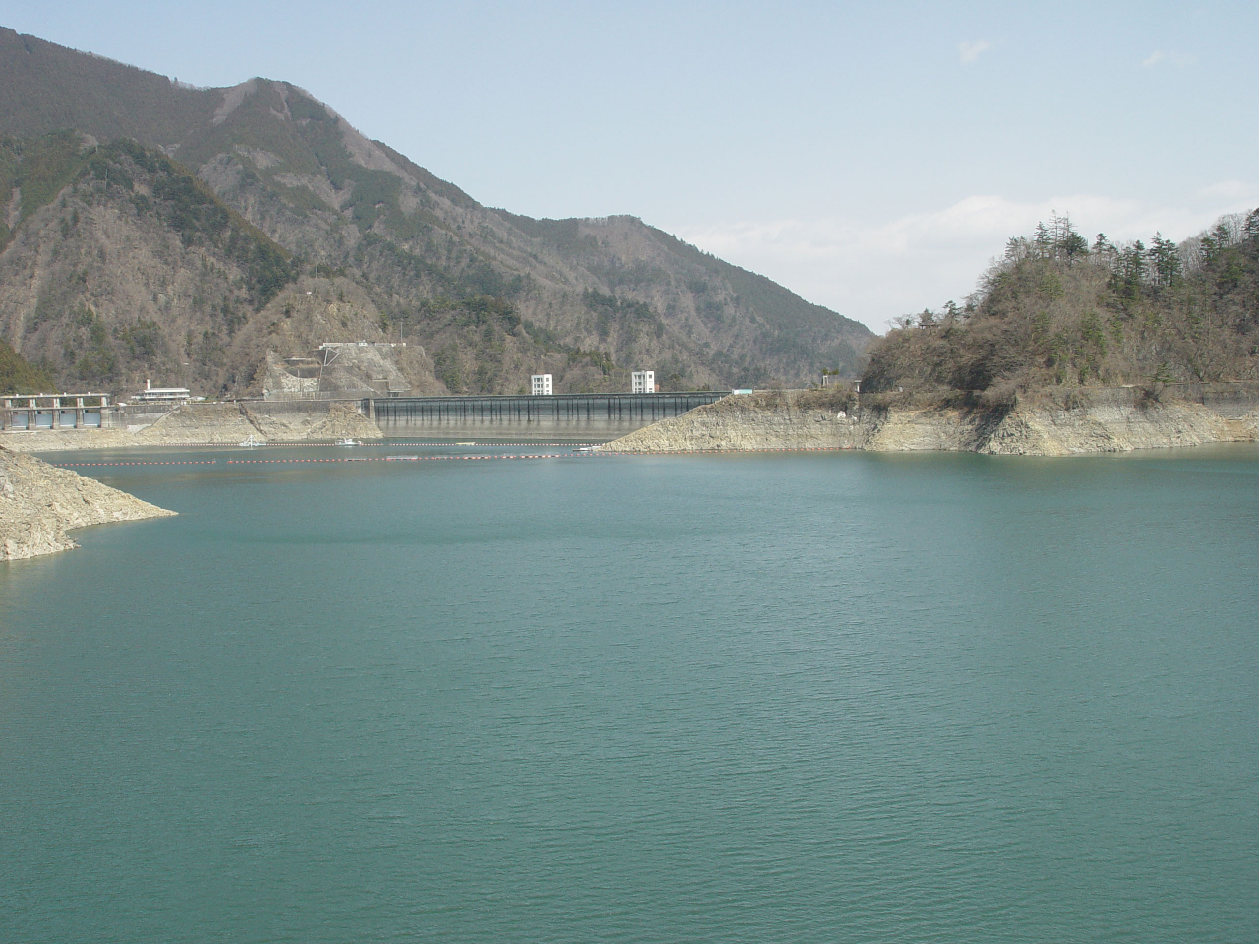 Lake Okutama, Okutama, Tokyo, Japan